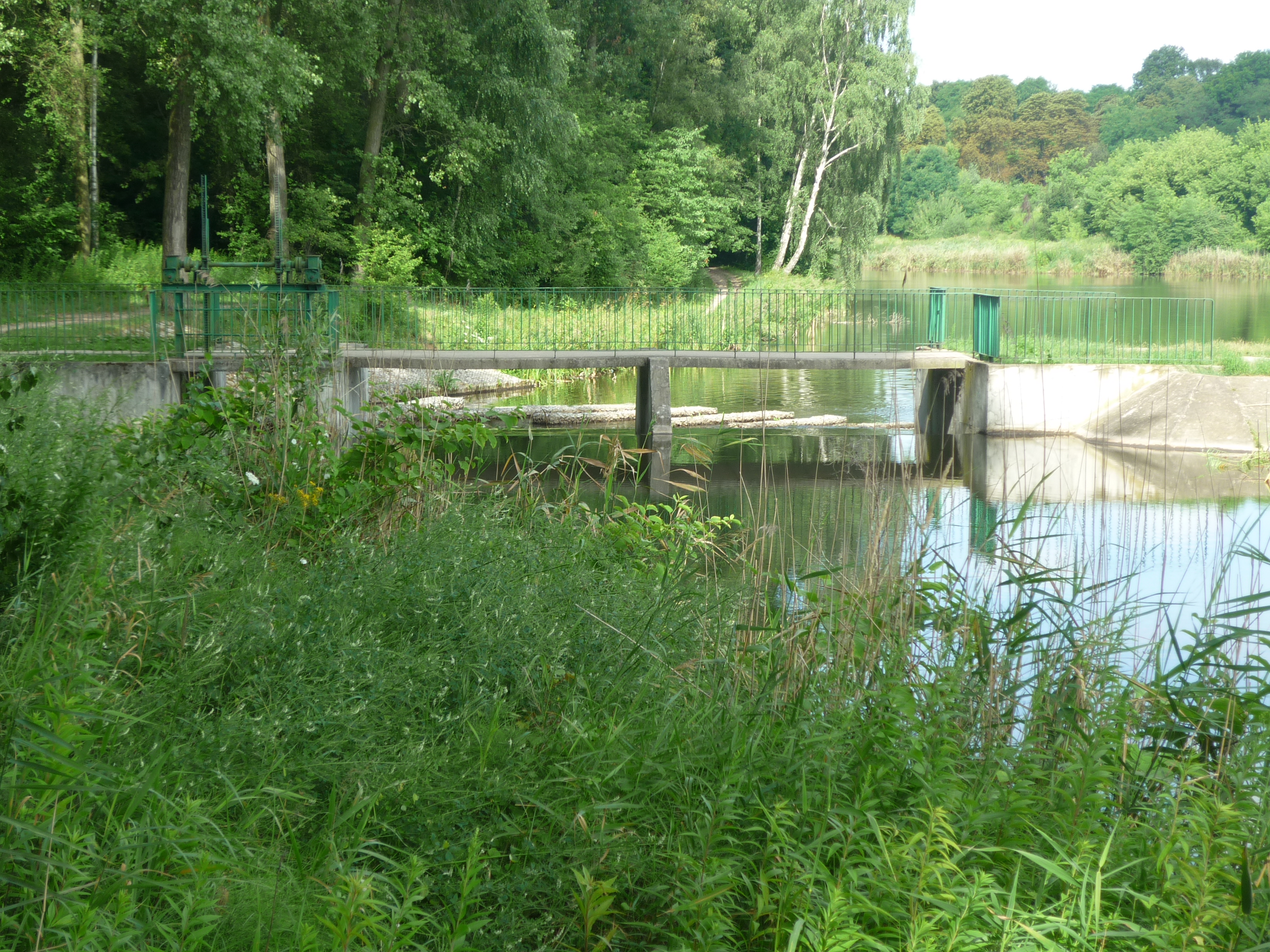 tama pomiędzy Młyńskim Stawem a Stawem Antoninek od strony Stawu Antoninek